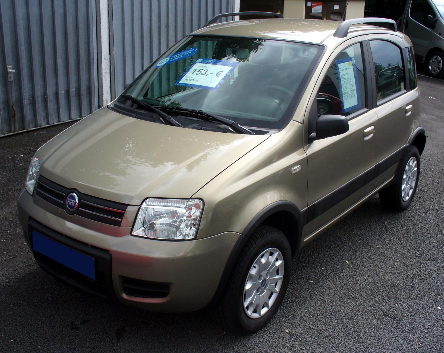 Fiat Panda 4x4 1.2 8V.